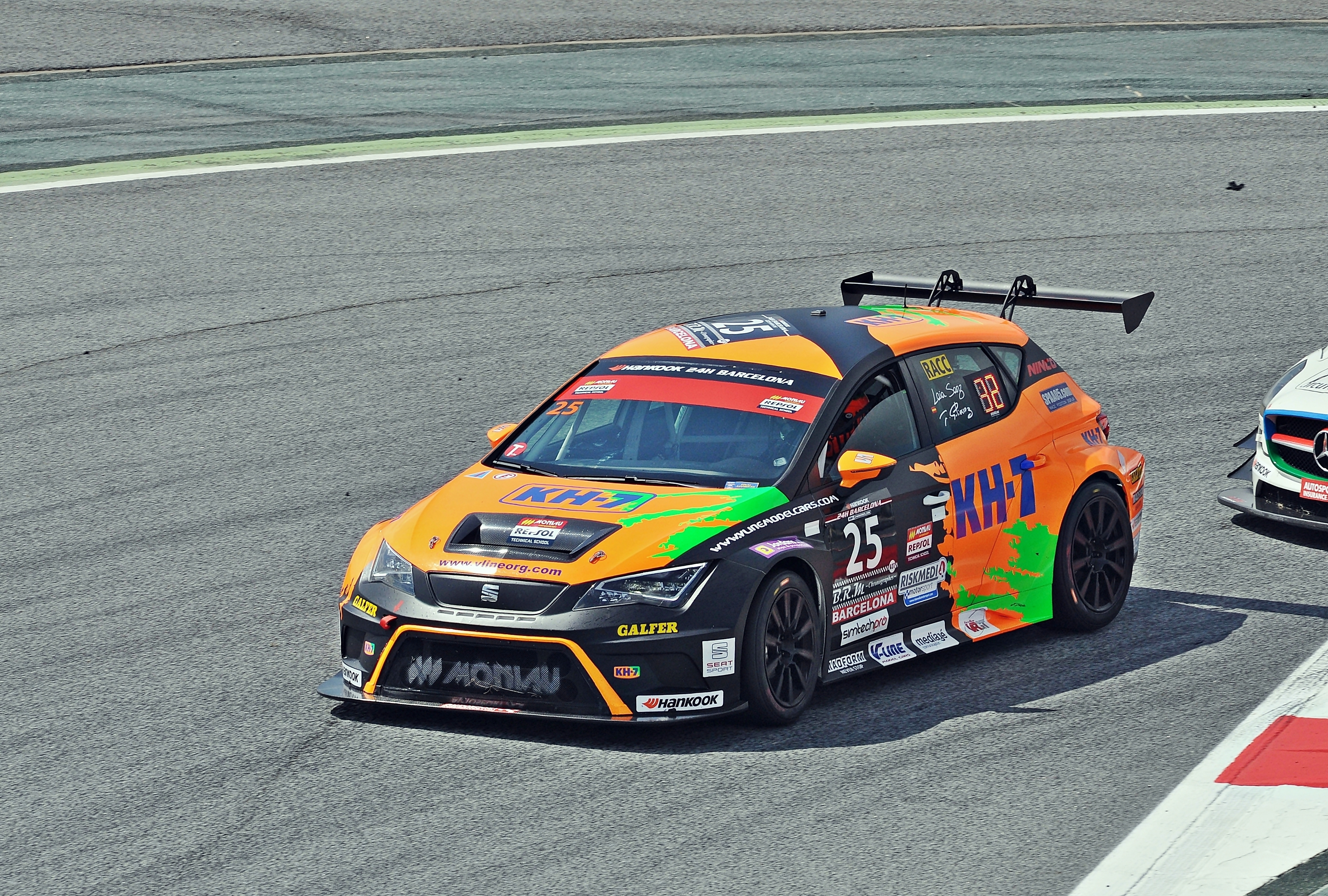 24 horas de Barcelona-circuito de Cataluña